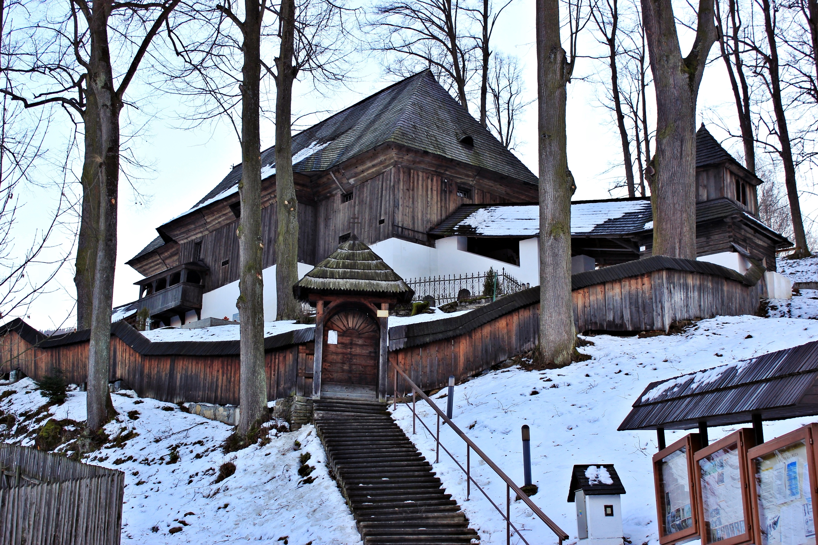 Artikulárny kostol Leštiny